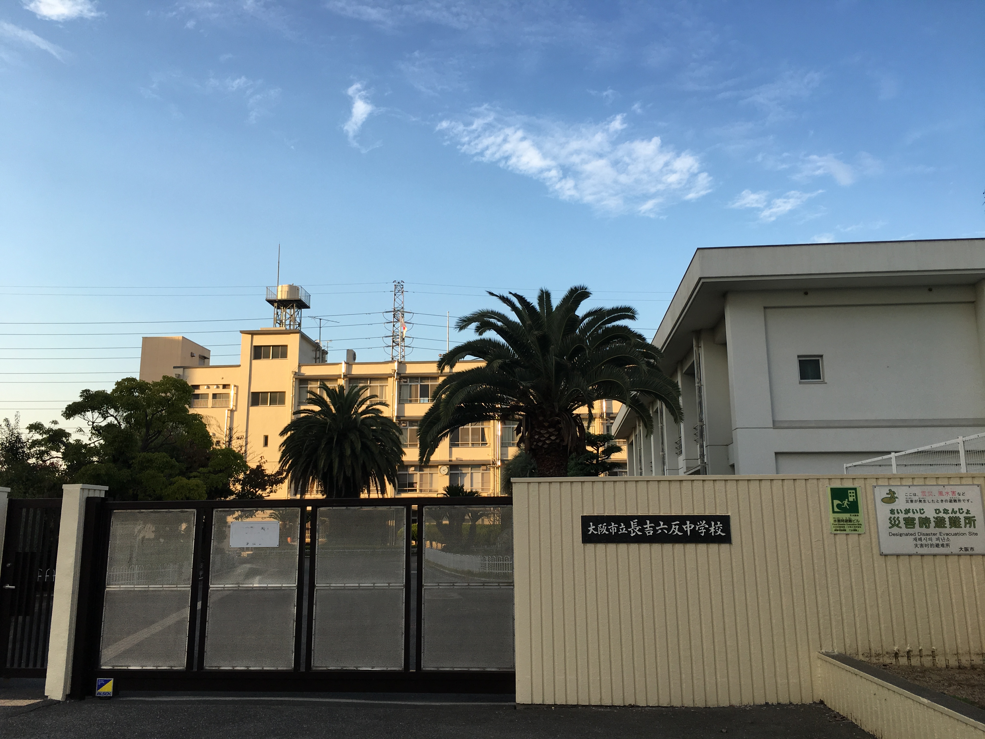 大阪市立長吉六反中学校